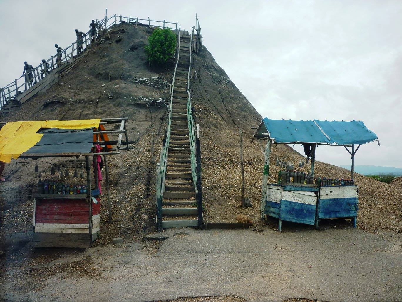 Bahenní sopka El Totumo